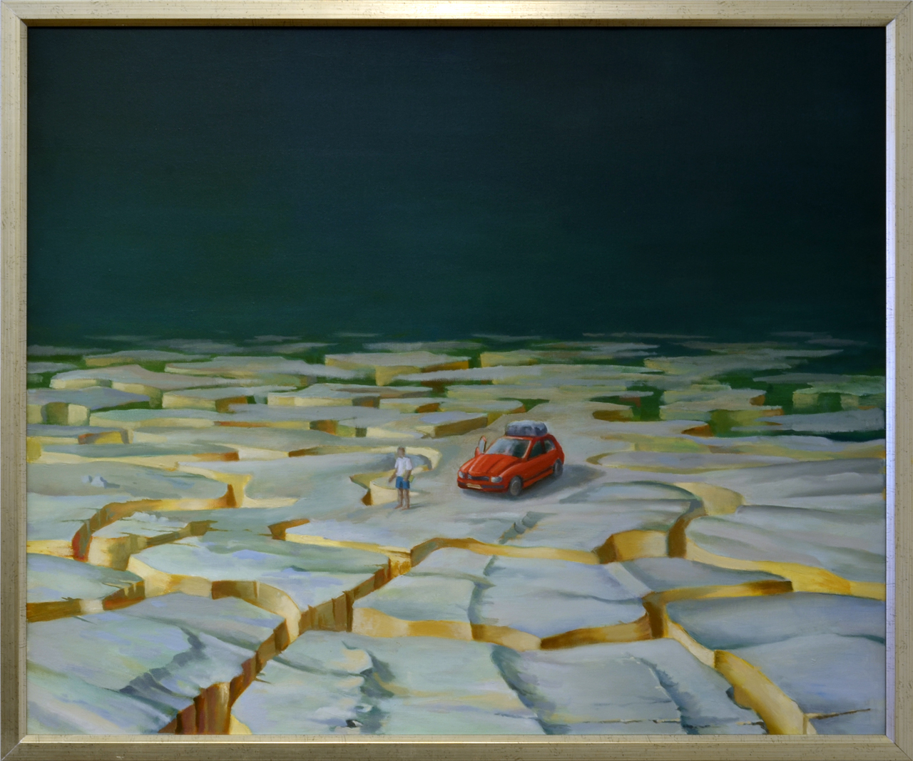 Milan Ressel, Cesta do Florencie I (2007)